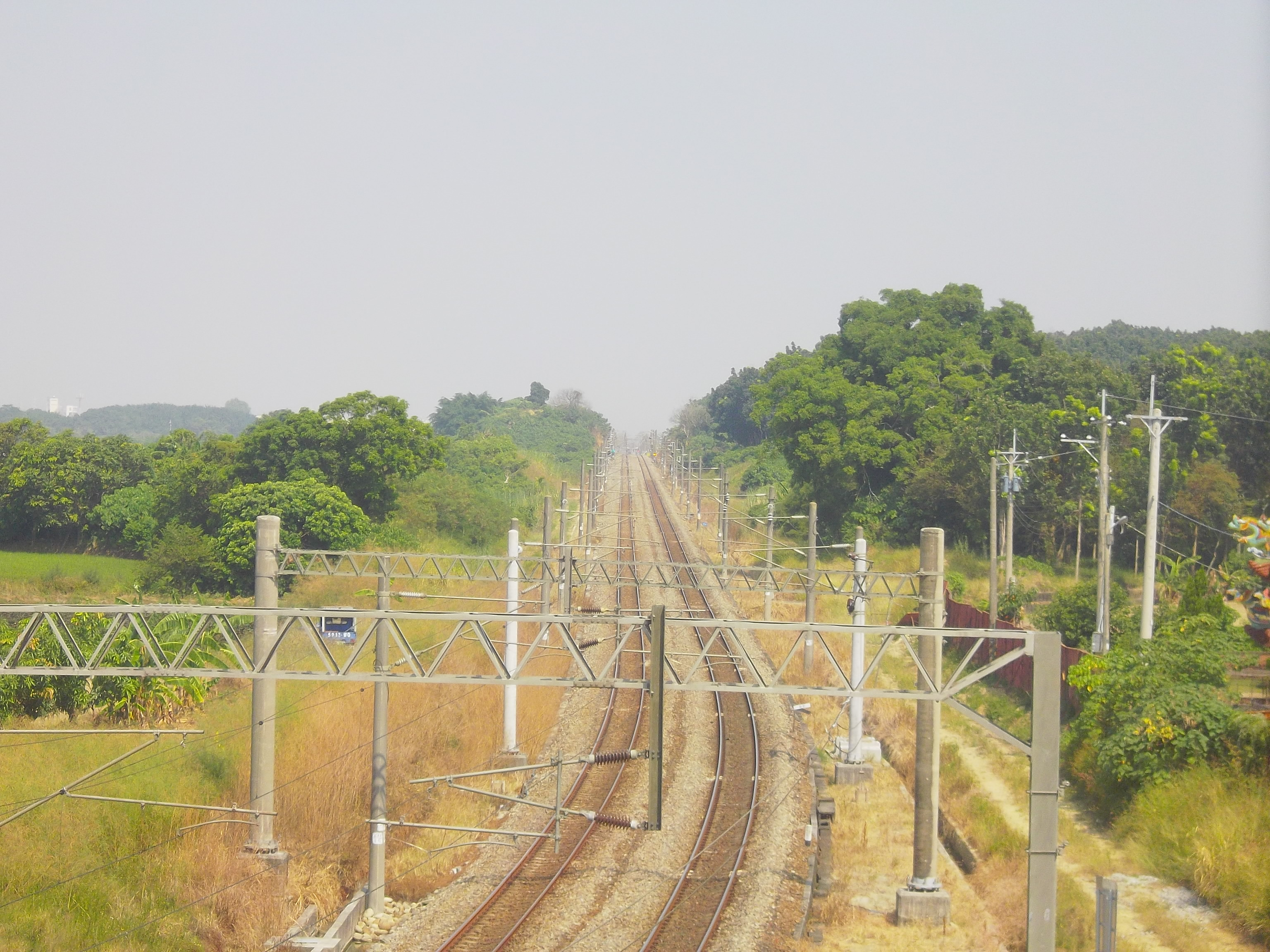 臺鐵縱貫線切過臺南官田川文山